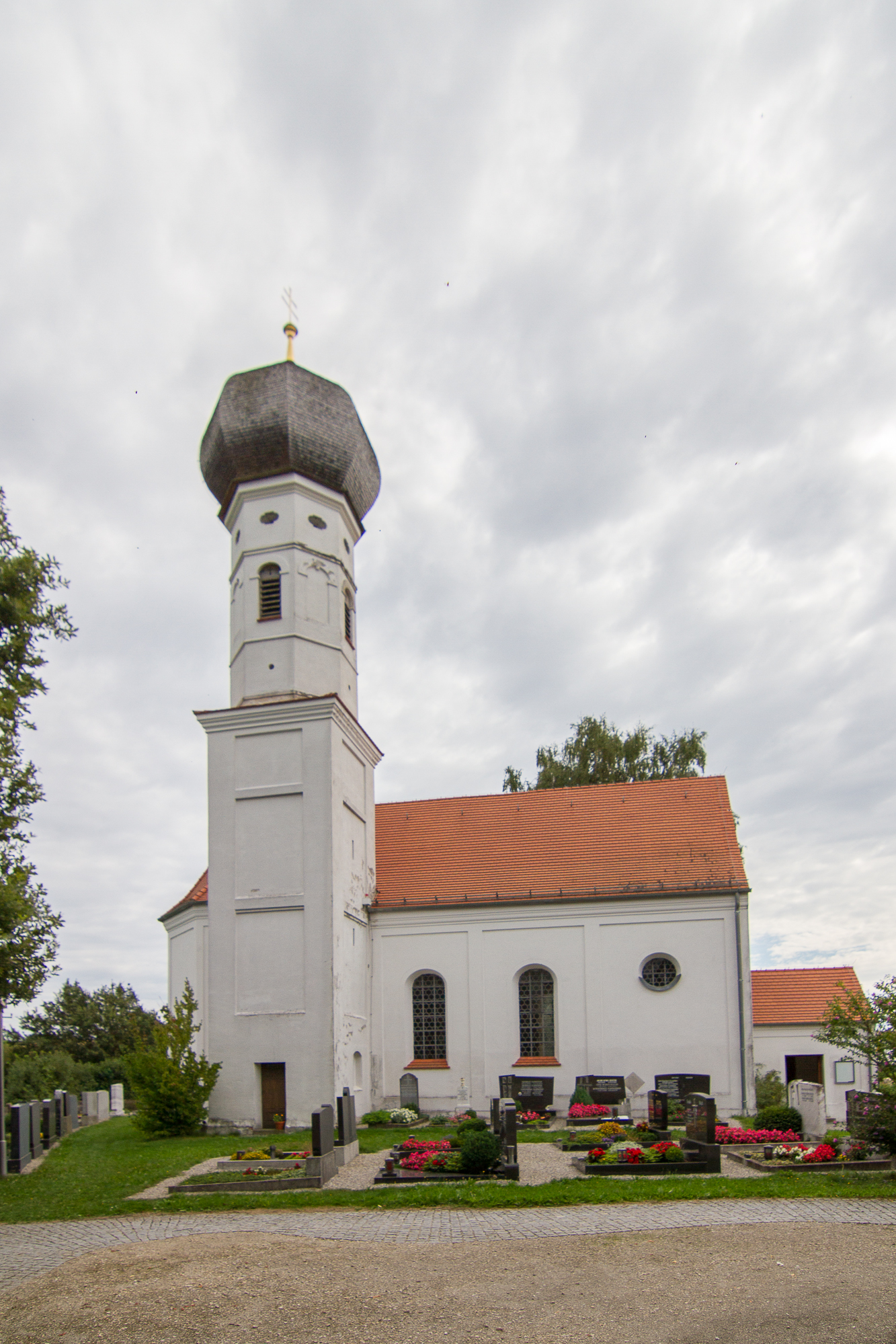 Kath. Filialkirche St. Georg erbaut 1717, noch im 18. Jahrhundert umgestaltet; mit Ausstattung.This is a photograph of an architectural monument.